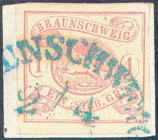 Briefmarke des Herzogtums Braunschweig von 1852, Rechte abgelaufen, PUBLIC DOMAIN